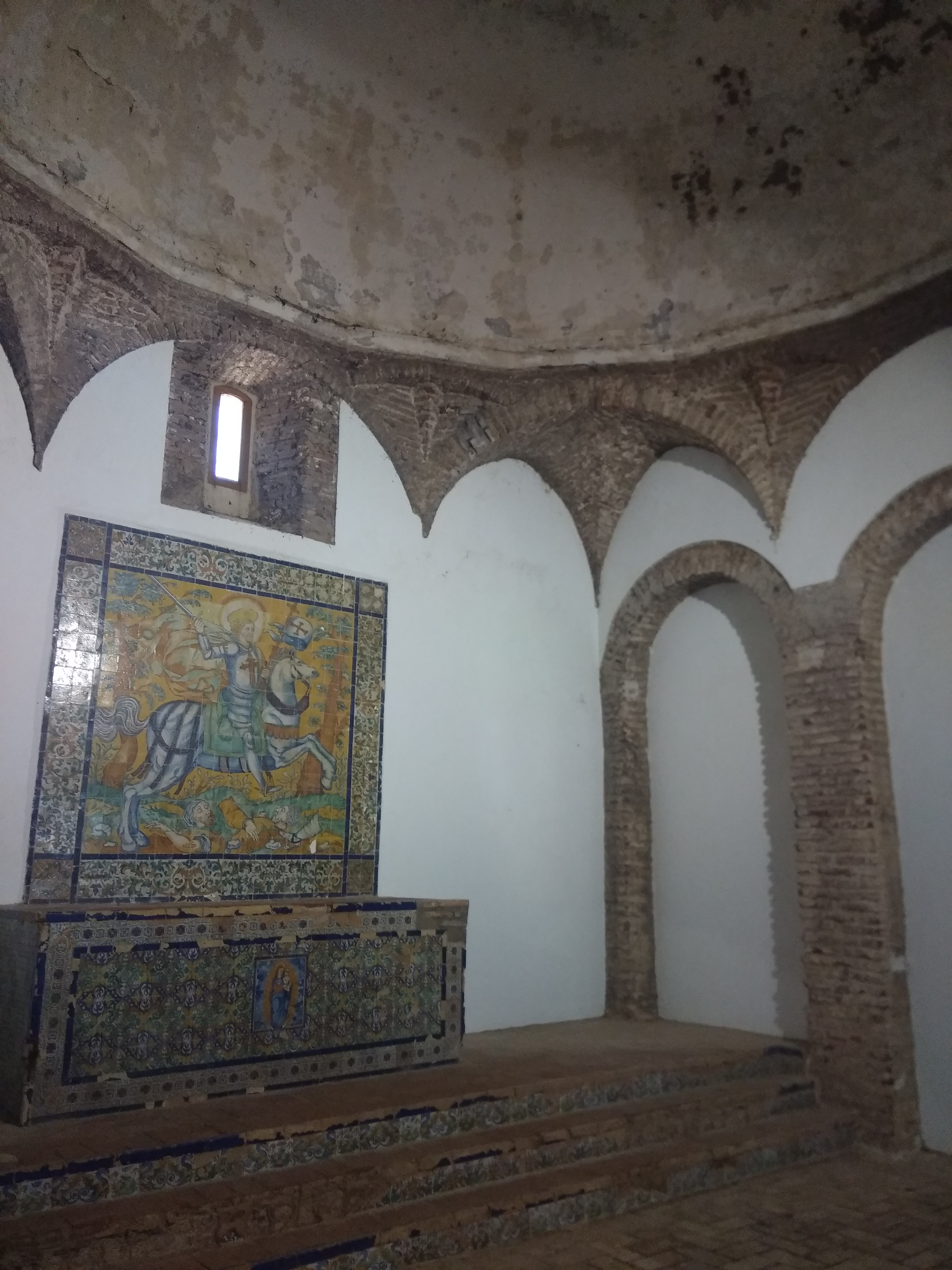 Monasterio de Tentudía, Badajoz, España, Capilla de Santiago